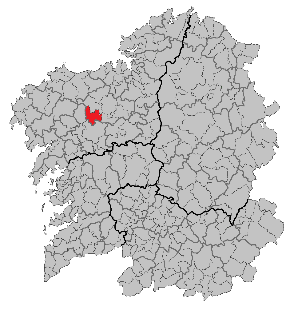 Mapa coa localización do concello de Trazo.